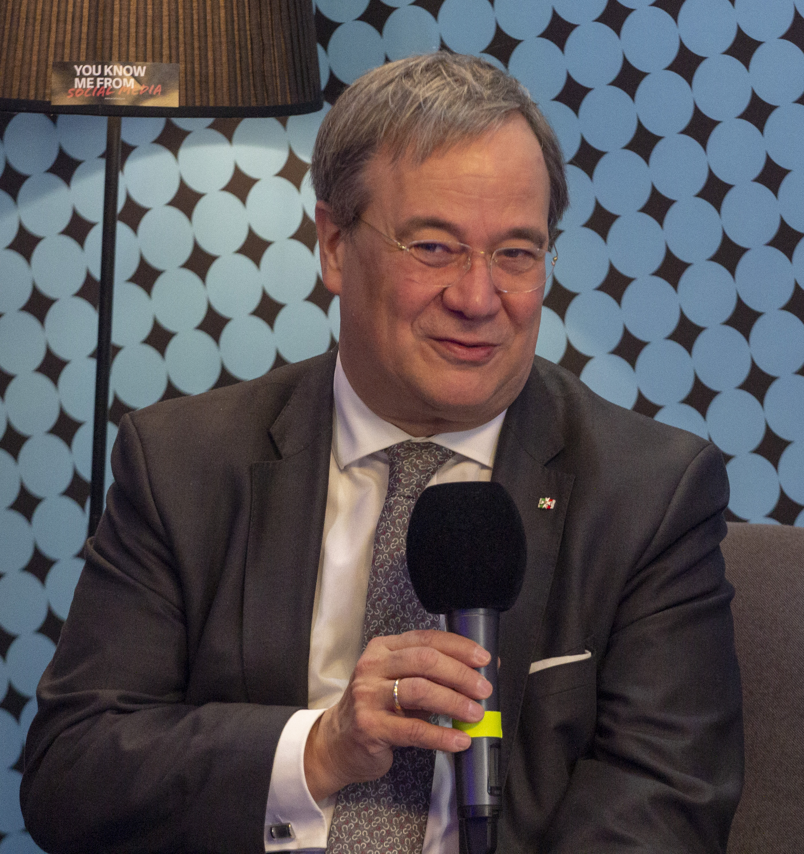 Armin Laschet auf dem CDU Parteitag 2019 am 23. November 2019 in Leipzig.